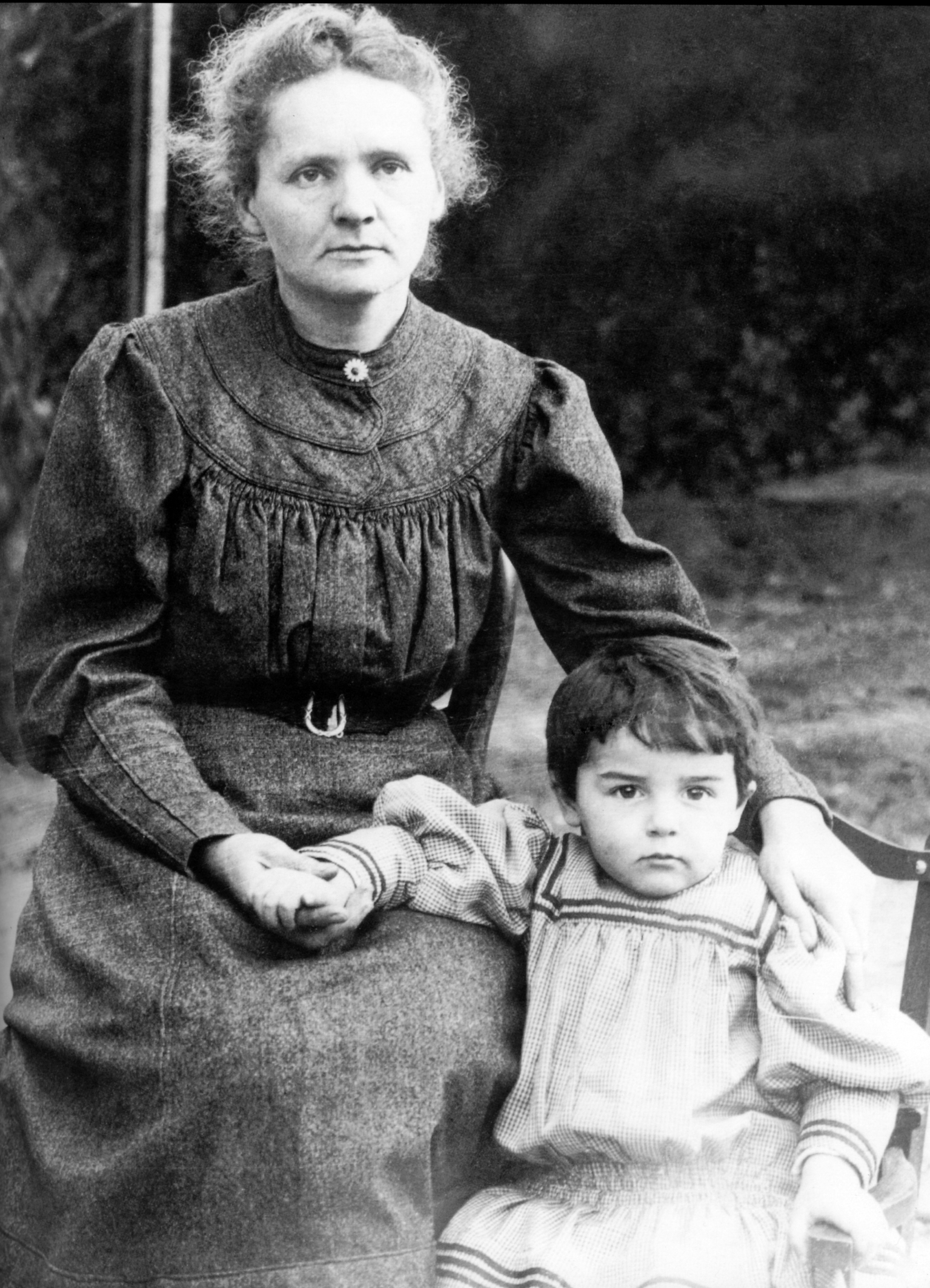 Eve z matką (1908)